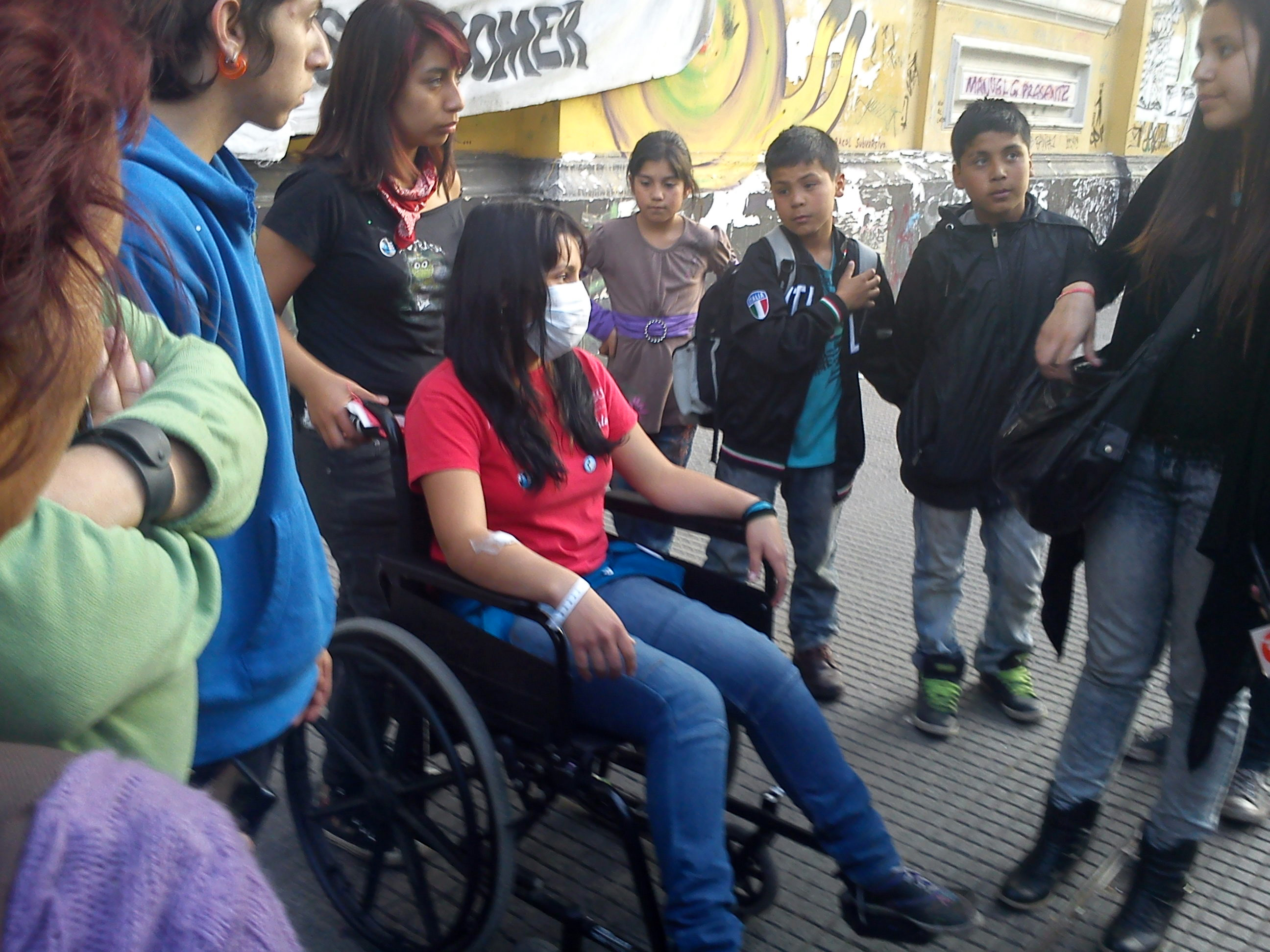 Estudiante del Liceo Darío Salas en huelga de hambre frente a la Universidad de Chile.